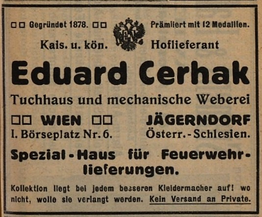 Annonce des k.k. Hoflieferanten Eduard Cerhak. in: Fromme's Österreichischer Feuerwehr-Kalender, 1913